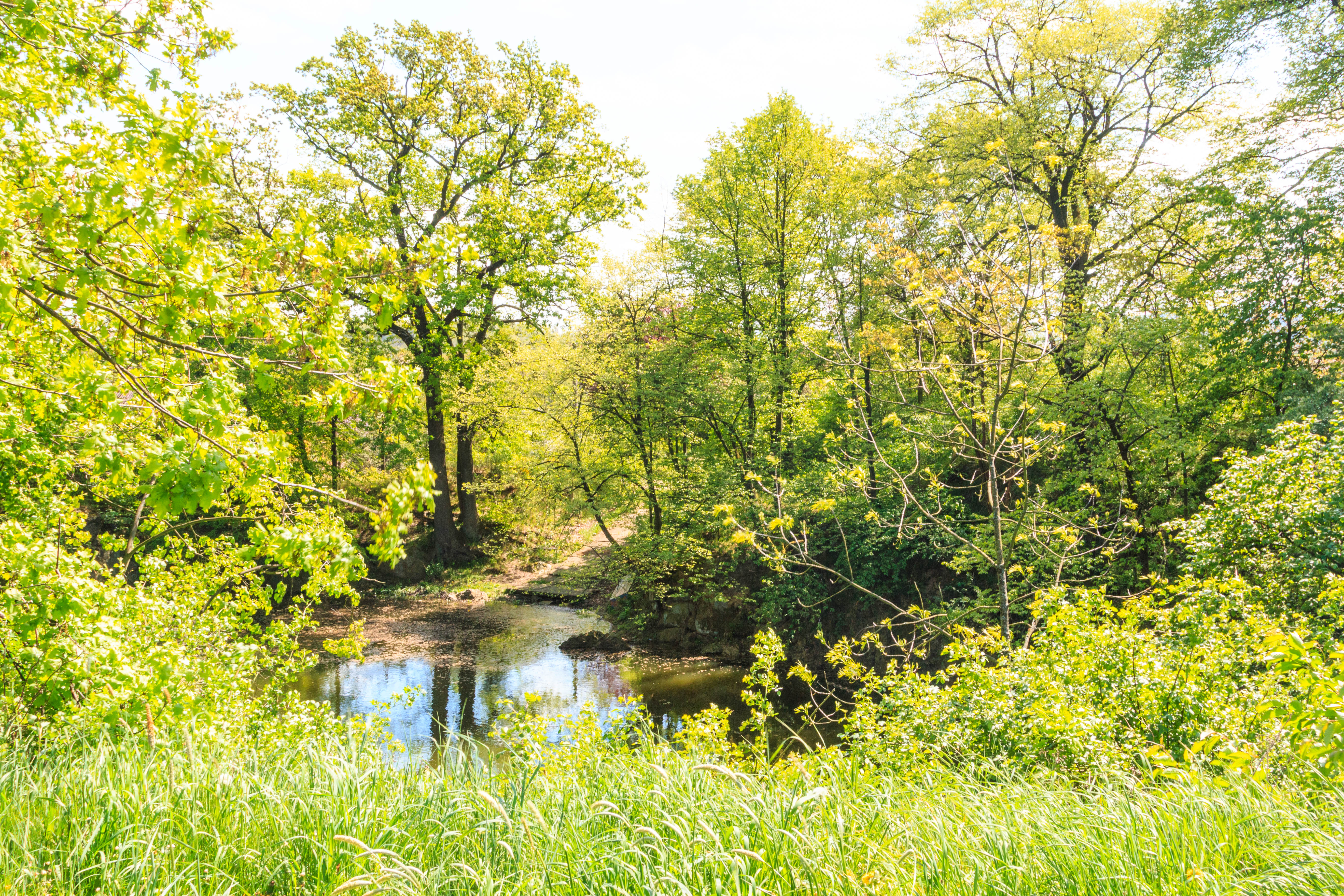 Návesní lom v Horních Raškovicích Project: Vodstvo